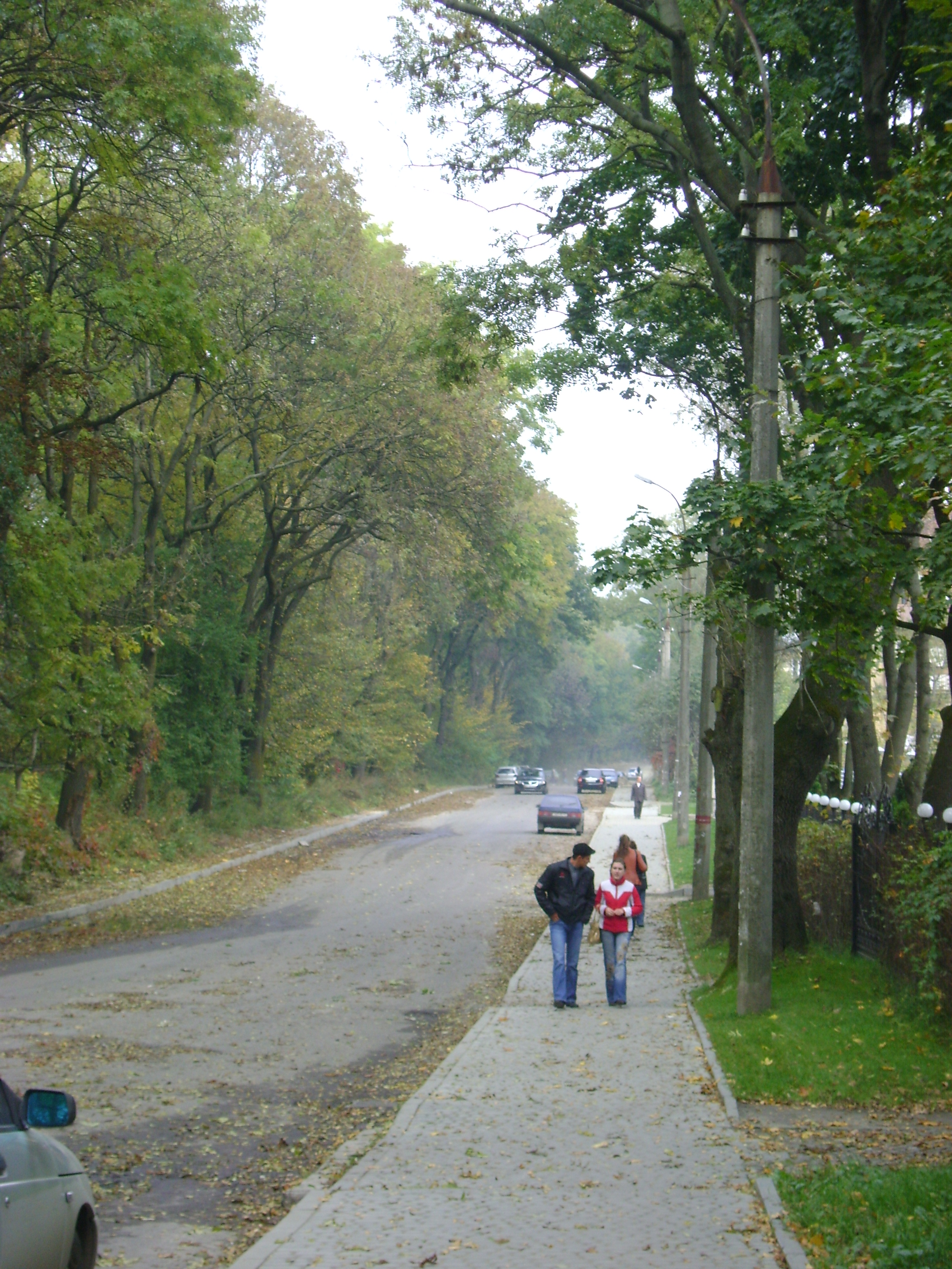 Софіївка3.jpg